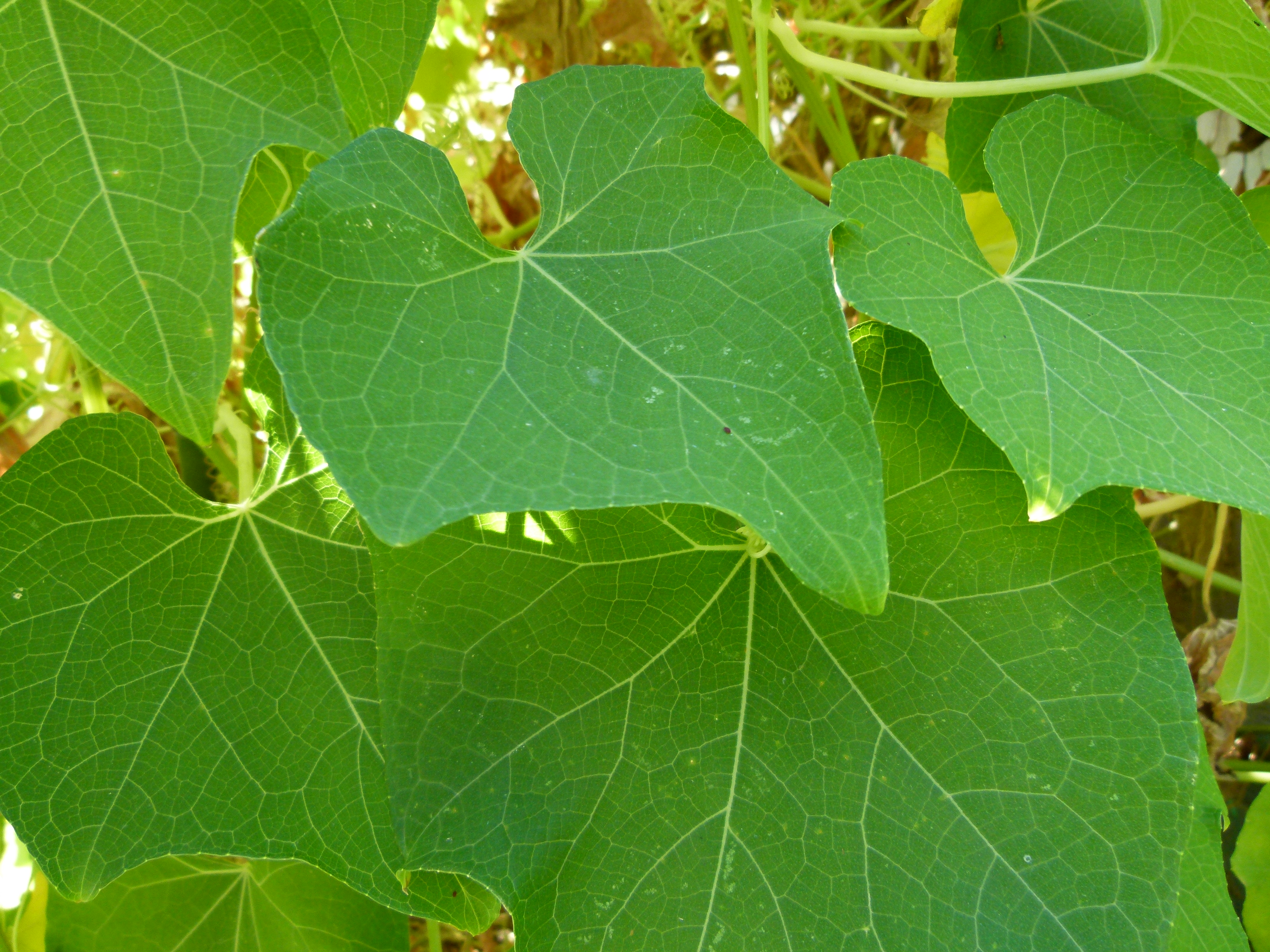 Chayotte